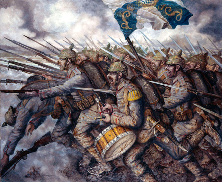 Sturmangriff